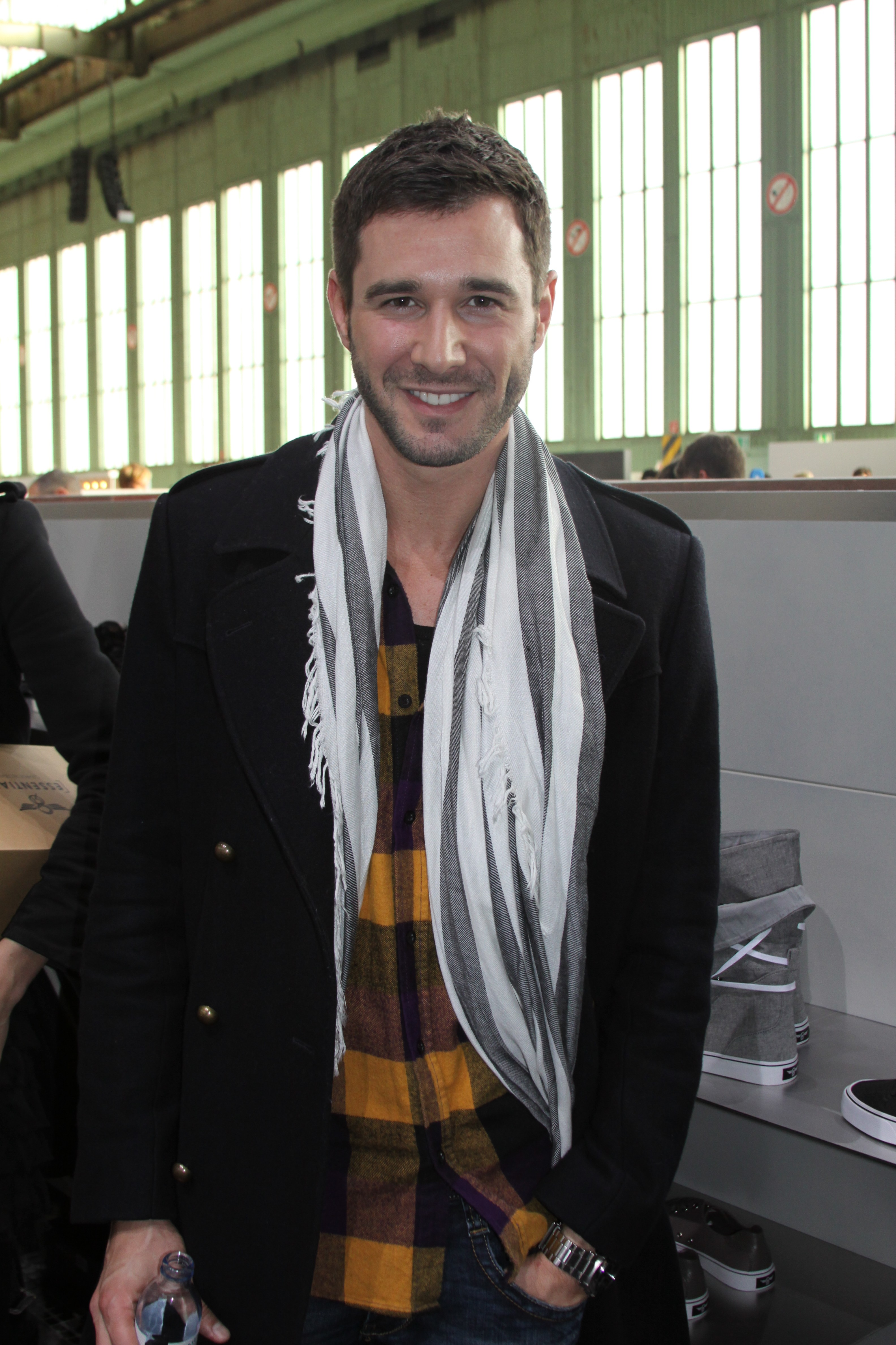 Jochen Schropp auf der Bread & Butter Fachmesse in Berlin